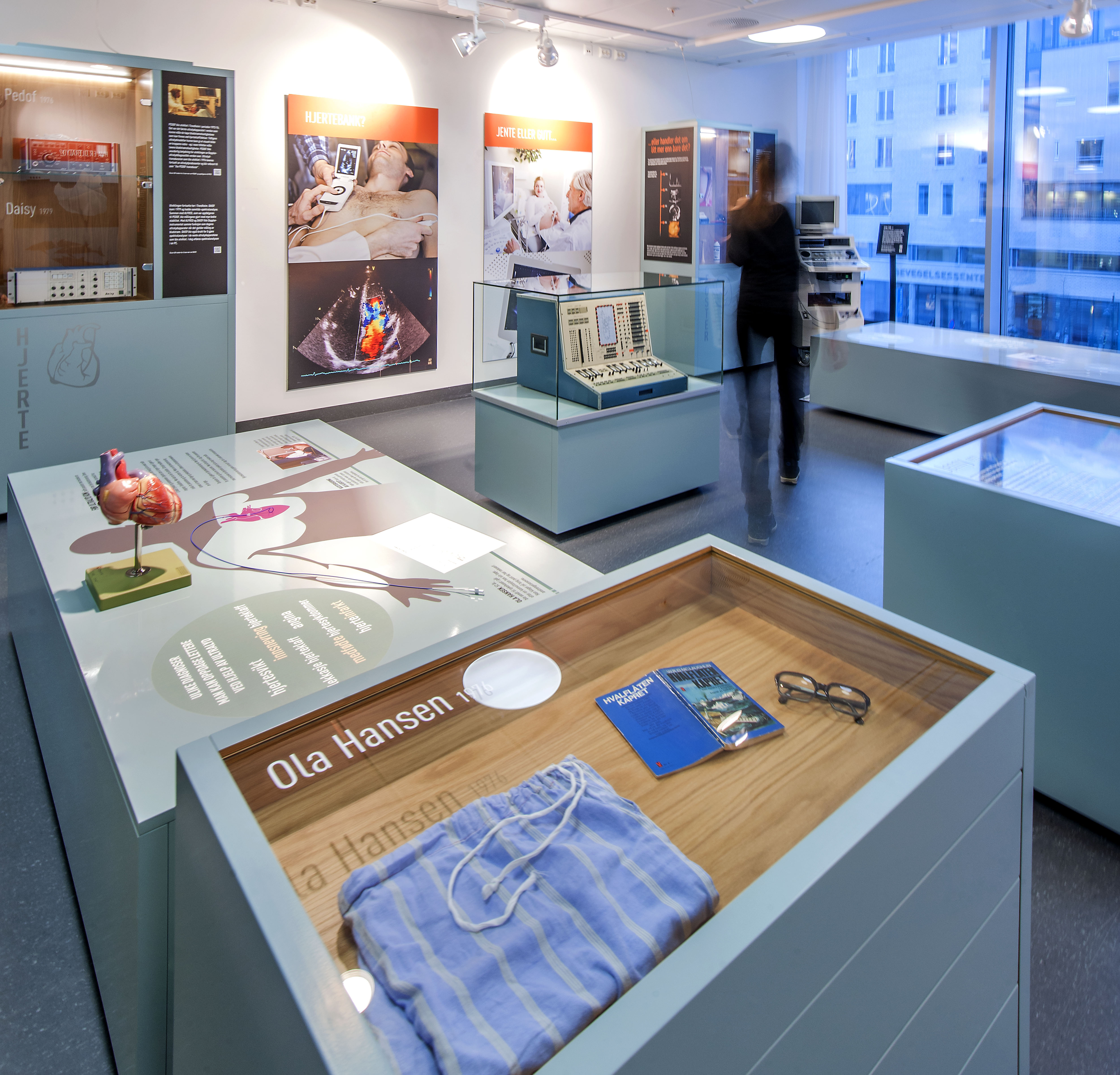 Medisinsk museum i Trondheim. Offisielt åpnet i januar 2014